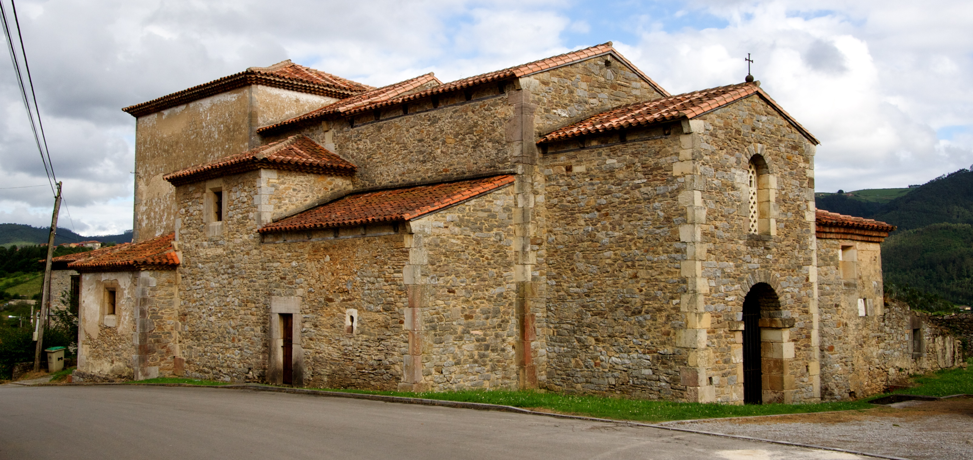 Iglesia prerrománcia de Santianes de Pravia, siglo VIII